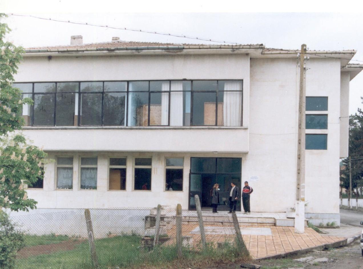 Сградата на Читалището на село Априлово, Поповско.